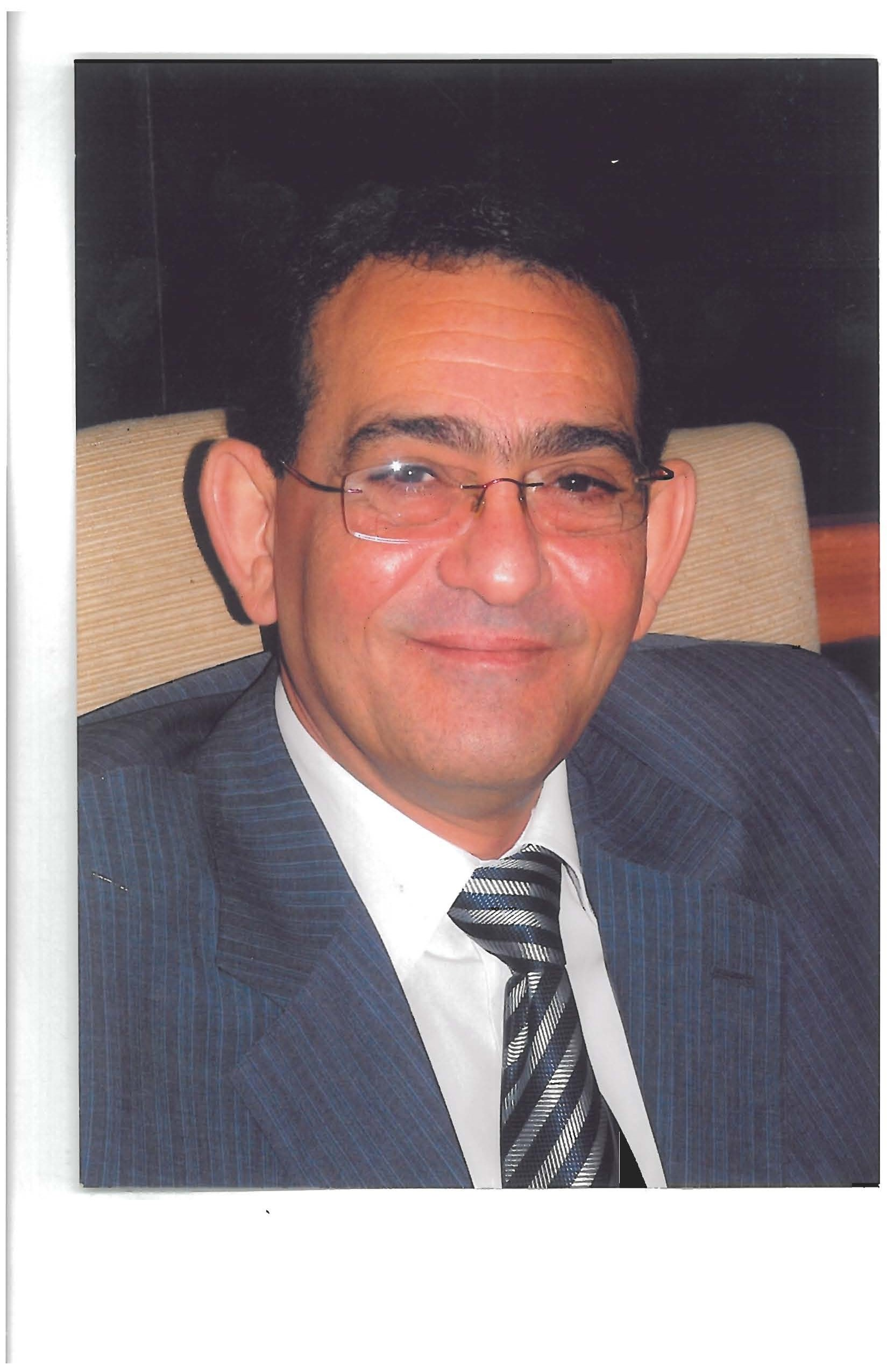 مهندس